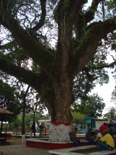 Gamelotal-Plaza Saman (donde Bolivar acampo antes de ir a la batalla los horcones)